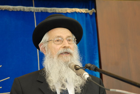 ישיבת מרכז הרב.